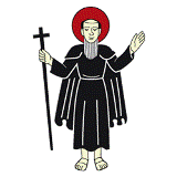 Flag of Rieden, Canton of St. Gallen - Flago de Rieden, Kantono de Sankt-Galo